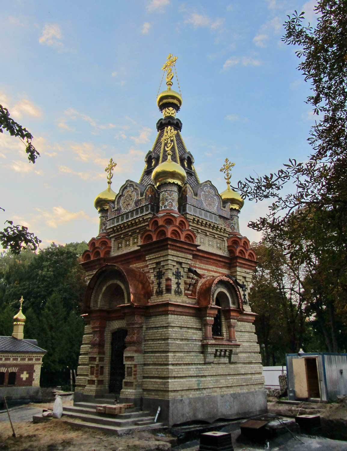 Беларуская (тарашкевіца): Палацава-паркавы ансамбаль: палац, дэкаратыўнае аздабленьне інтэр’ера вежы і цэнтральнай залі палаца, Петрапаўлаўскі сабор, капліца-пахавальня,парк. г. Гомель This is a photo of Belarusian heritage monument. Reference number: 310Г000044 ( WLM)